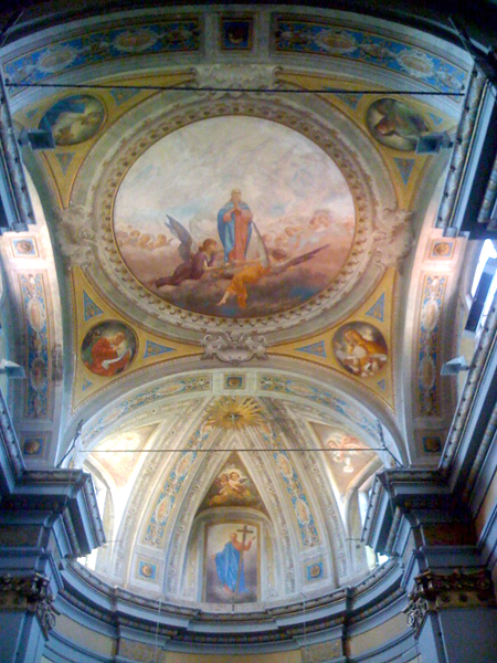 Particolare dell'interno della chiesa parrocchiale della B.M.V. del Rosario di San Giuliano Nuovo con gli affreschi di Rodolfo Gambini